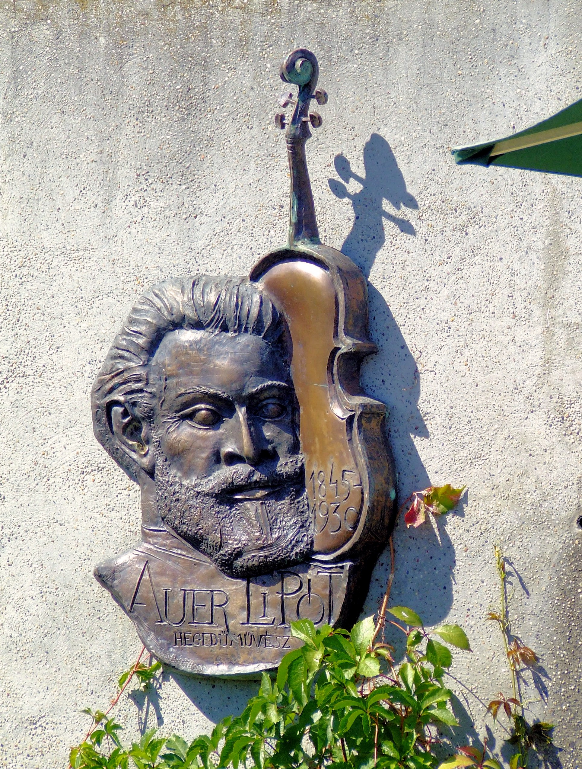 Auer Lipót dombormű Veszprémben. Kő Pál alkotása (1994)